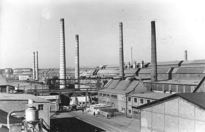 Magdeburg, SAG Schwermaschinenbau, Werksgelände Zentralbild Biscan 17.9.1953 SAG-Betriebe werden volkseigen Schwermaschinenbau "Georgij Dimitroff" Zu den 33 SAG-Betrieben, die im Sinne des Moskauer Abkommens zwischen der Sowjtunion und der DDR mit Beginn des Jahres 1954 in deutsche Hand übergeben werden, gehört der Schwermaschinenbau "Georgij Dimitroff" in Magdeburg, das ehemalige Otto-Gruson-Werk. Als einer der grössten Schwermaschinenbetriebe der DDR erzeugt das Dimitroff-Werk vor allem Getriebe für höchste Leistung und Beanspruchung, für Walzerke u.ä.. Zu dem Maschinenpark des Werkes gehören Spezialmaschinen, die in der DDR einmalig sind und die Herstellung von Zahnrädern von 4 und 5 Metern Durchmesser ermöglichen. UBz: Teilansicht der weiträumigen Werkanlagen des Schwermaschinenbaus "Georgij Dimitroff" in Magdeburg.